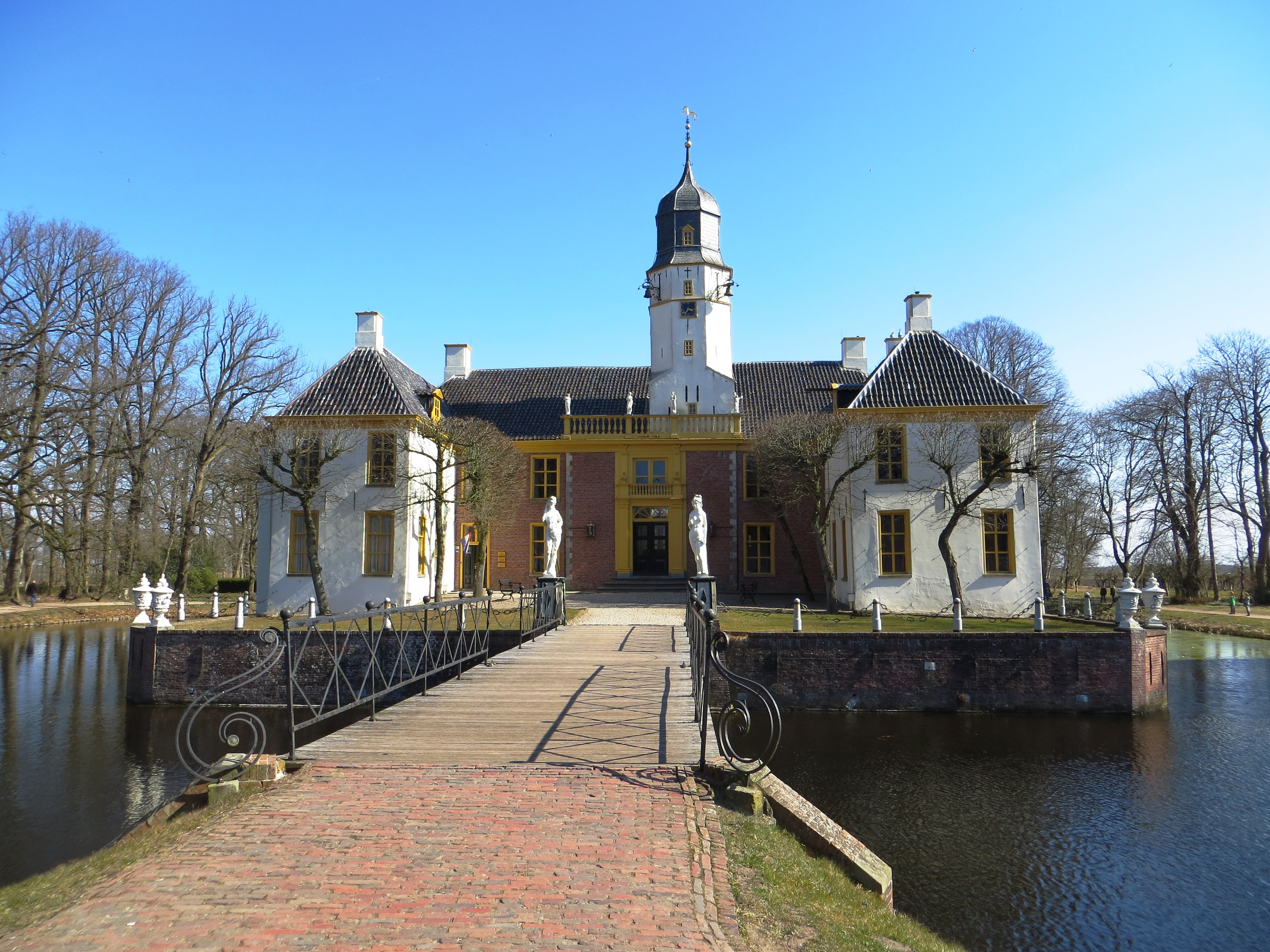 Fraeylemaborg - Slochteren